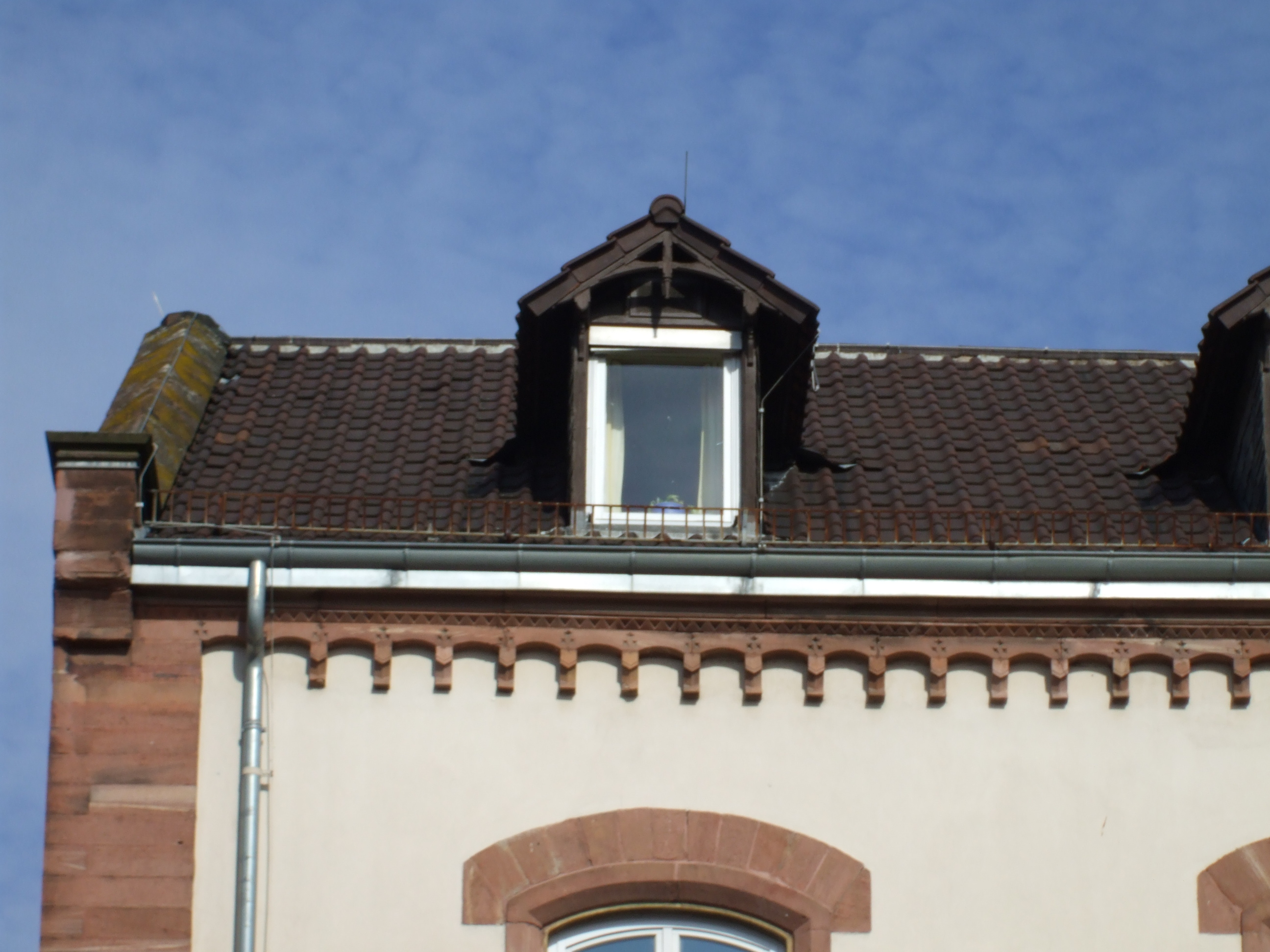 (Zinnen?)-Fries unter der Regenrinne